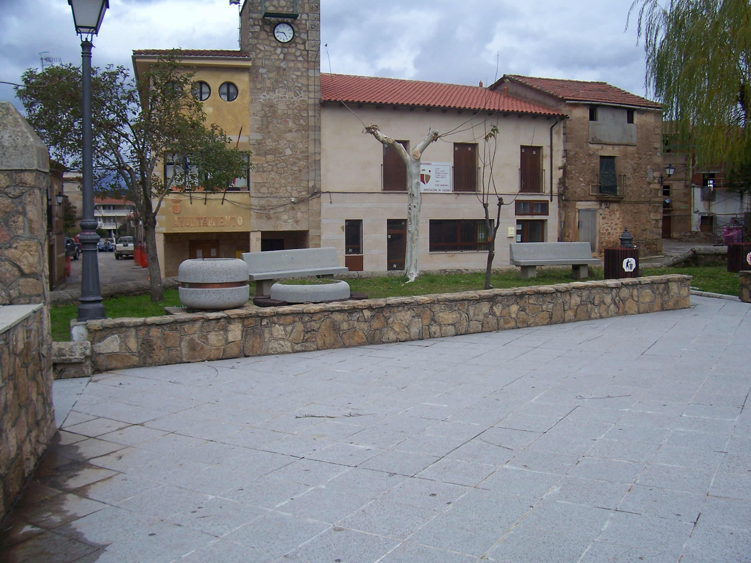 Plaza del Palacio, Villasbuenas de Gata, provincia de Cáceres, España.